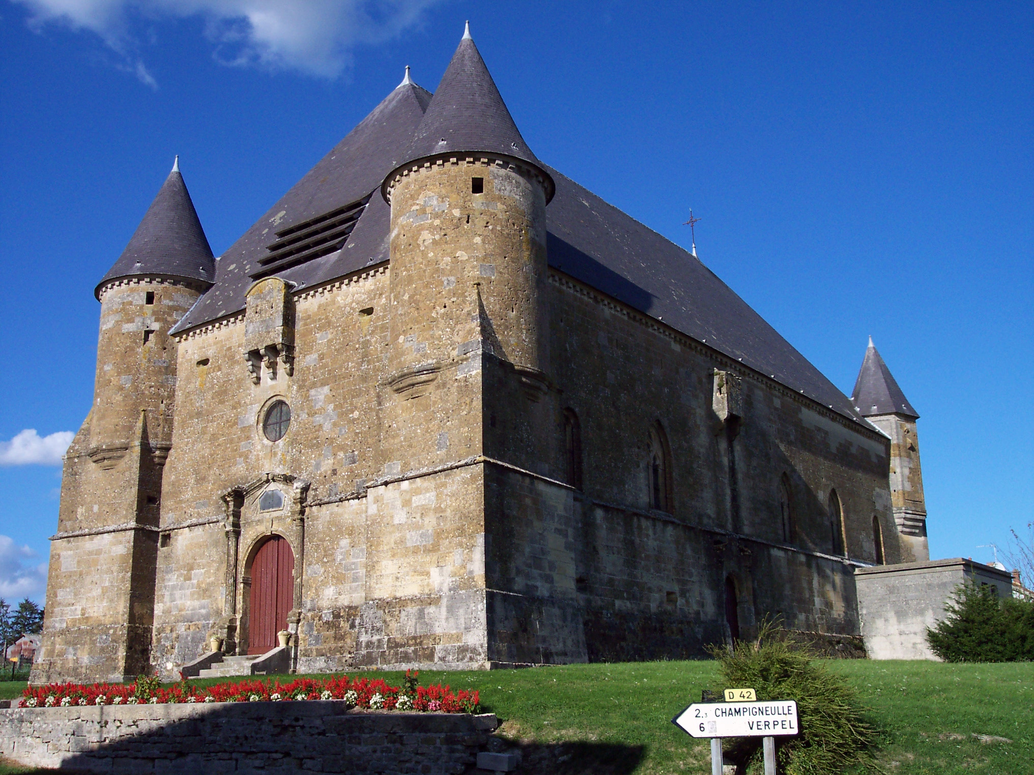 Eglise fortifiée de Saint Juvin vue de trois quart, photo prise mi-septembre